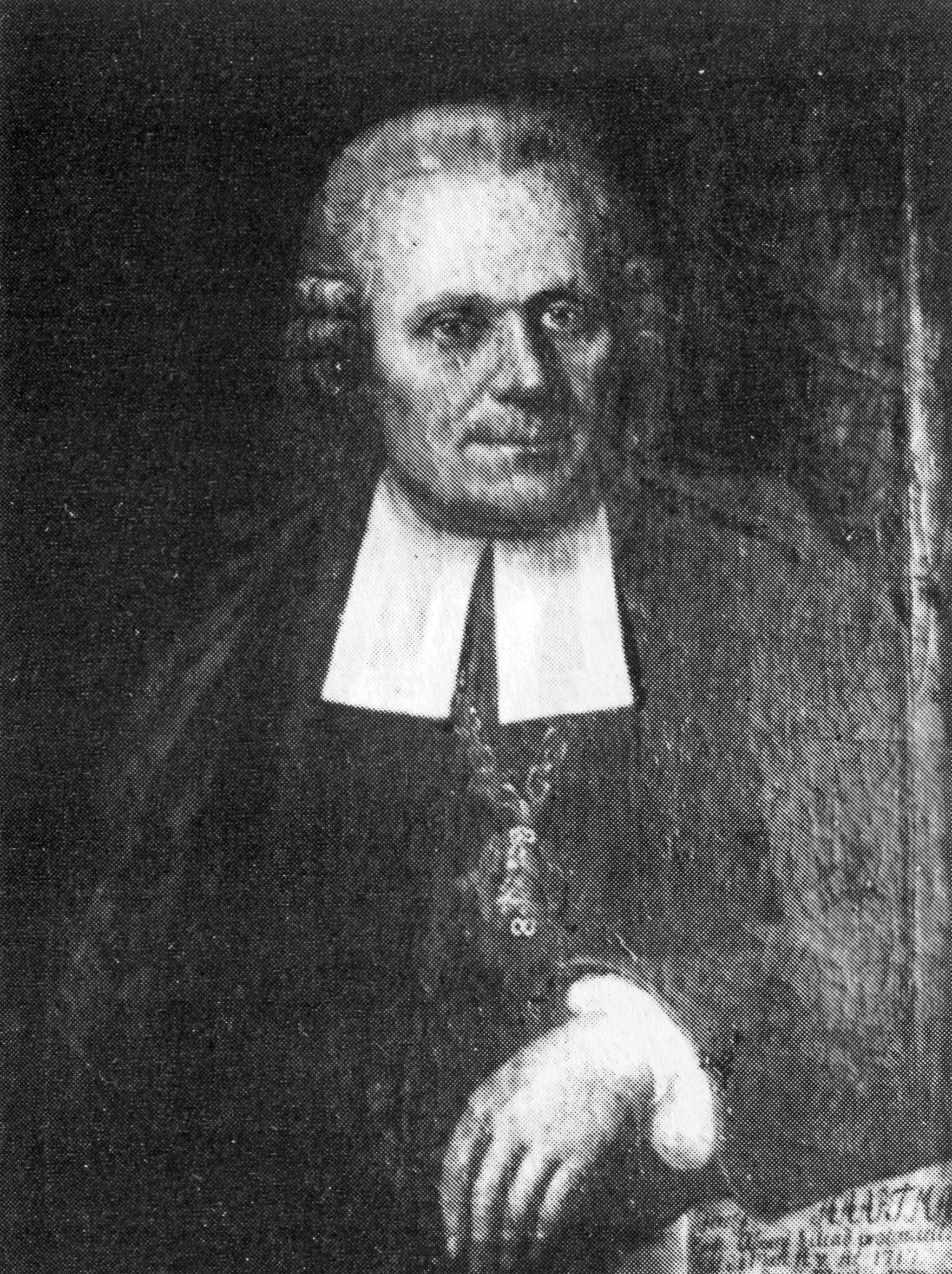 Biskopen i Borgå, Jakob Haartman. Oljemålning av okänd konstnär (Anders Eklund?)